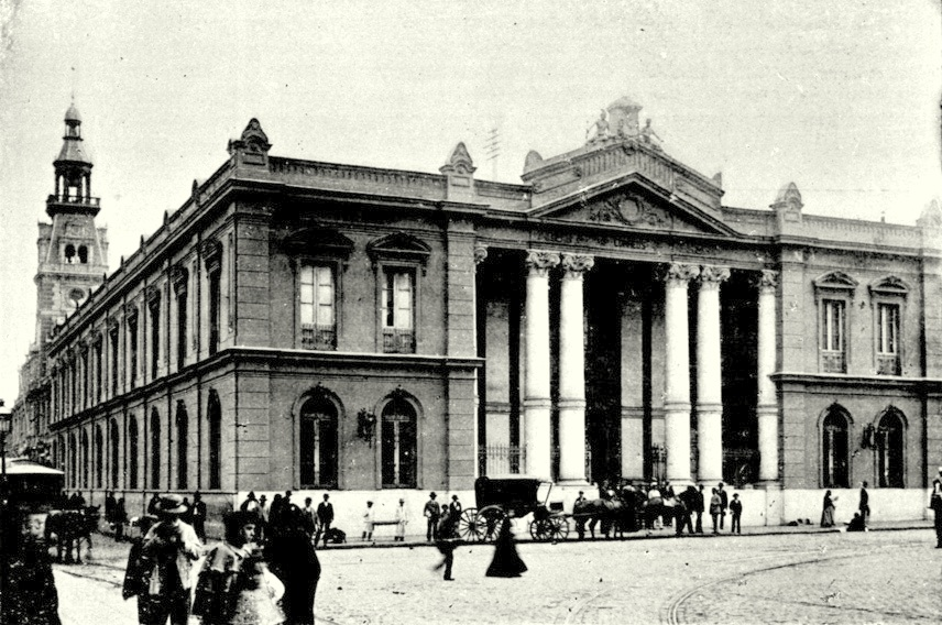 Imagen en Chile descripción física, política, social industrial y comercial de la República de Chile, por Carlos Tornero.1903